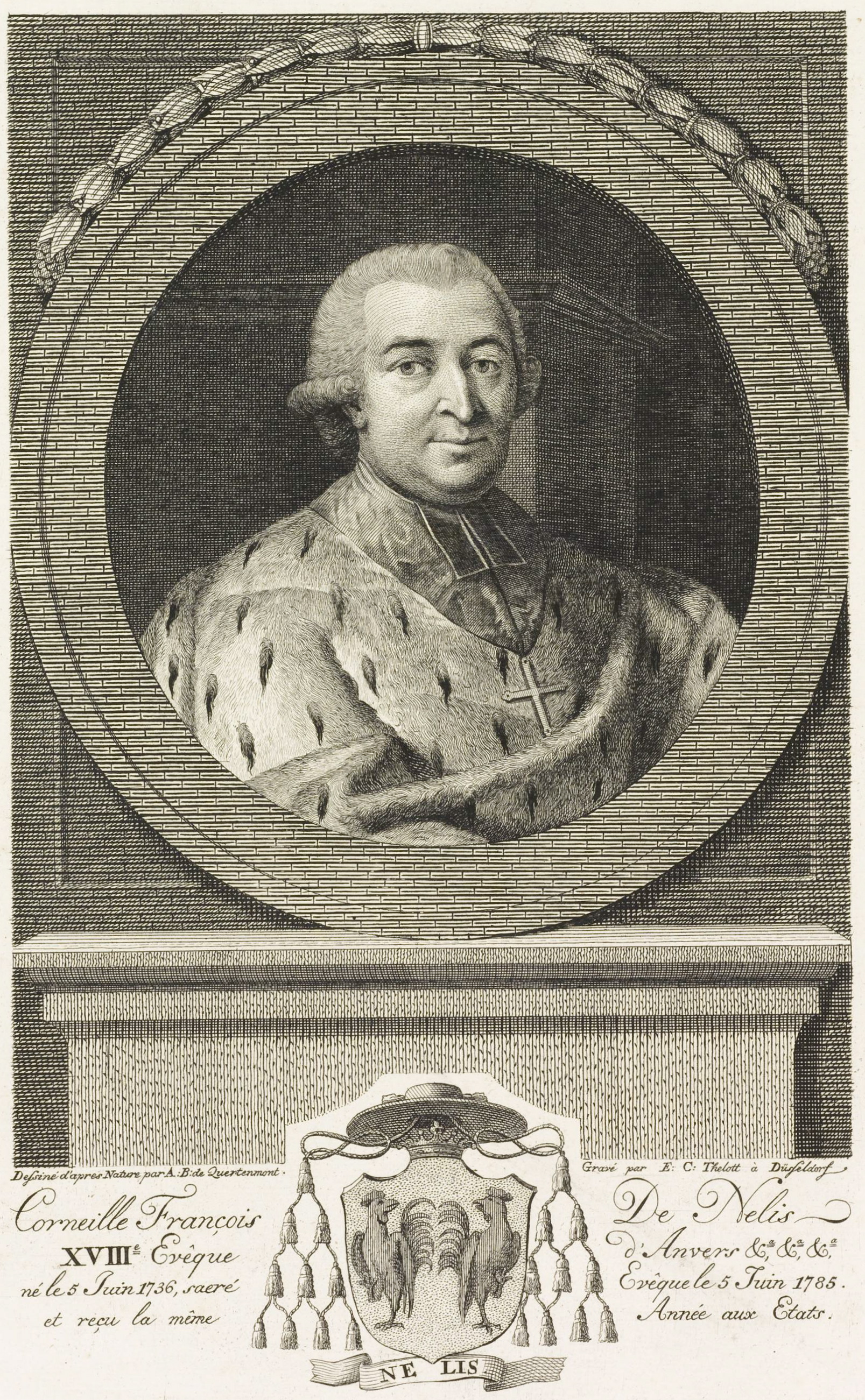 Portrait de Cornelius Franciscus de Nelis, bisschop van Antwerpen (1736-1798)